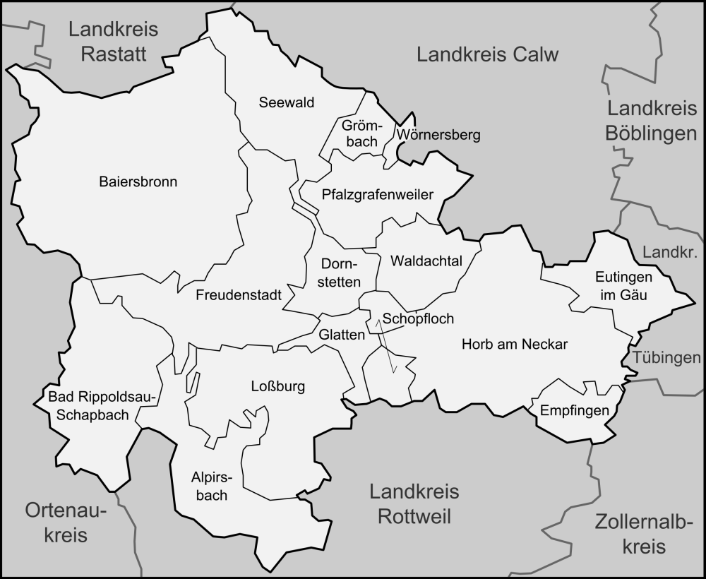 Karte der Gemeinden des Landkreises Freudenstadt, sowie der umliegenden Landkreise